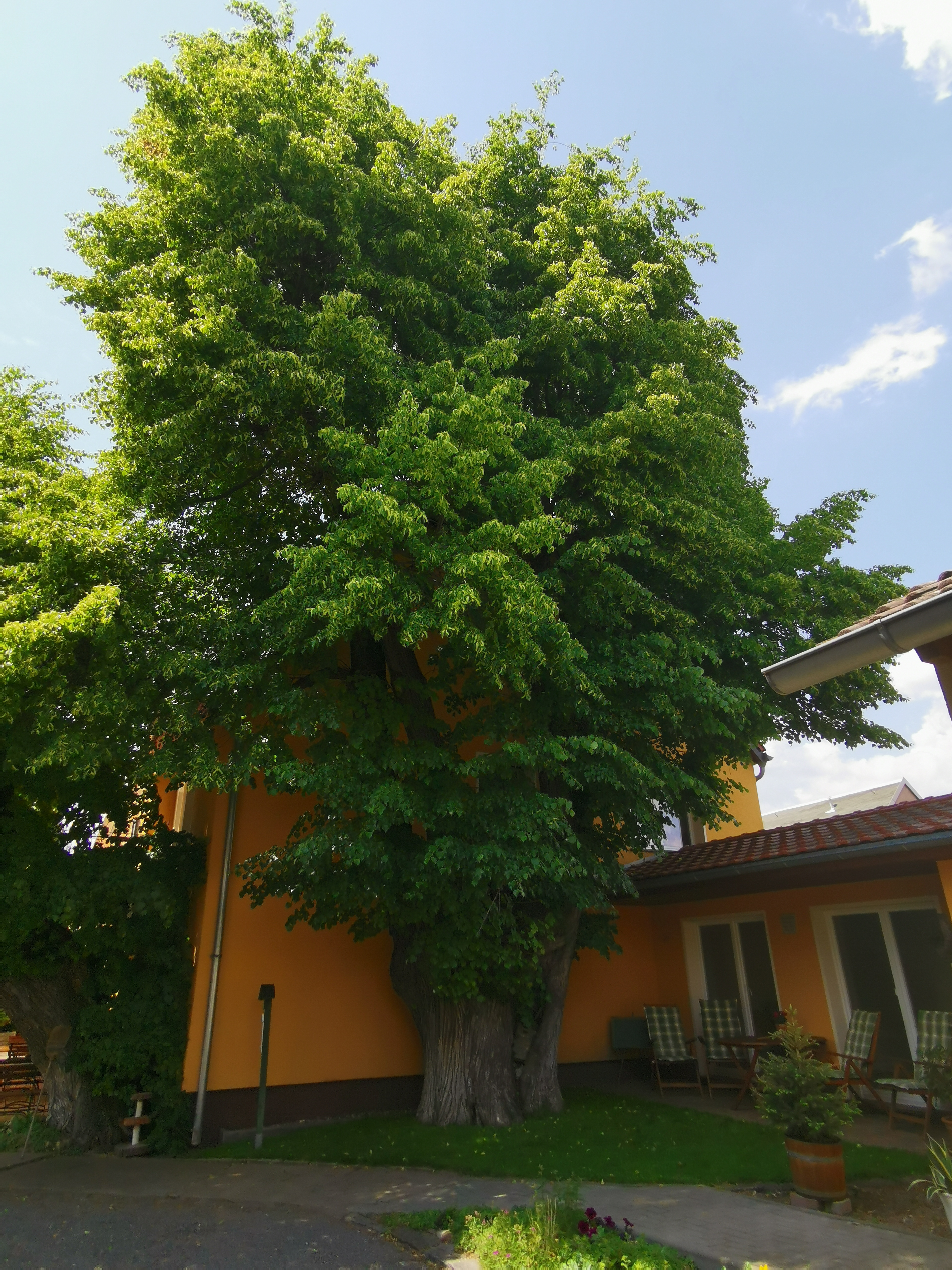 Als Naturdenkmal geschützte Winterlinde am Gasthof Großkmehlen